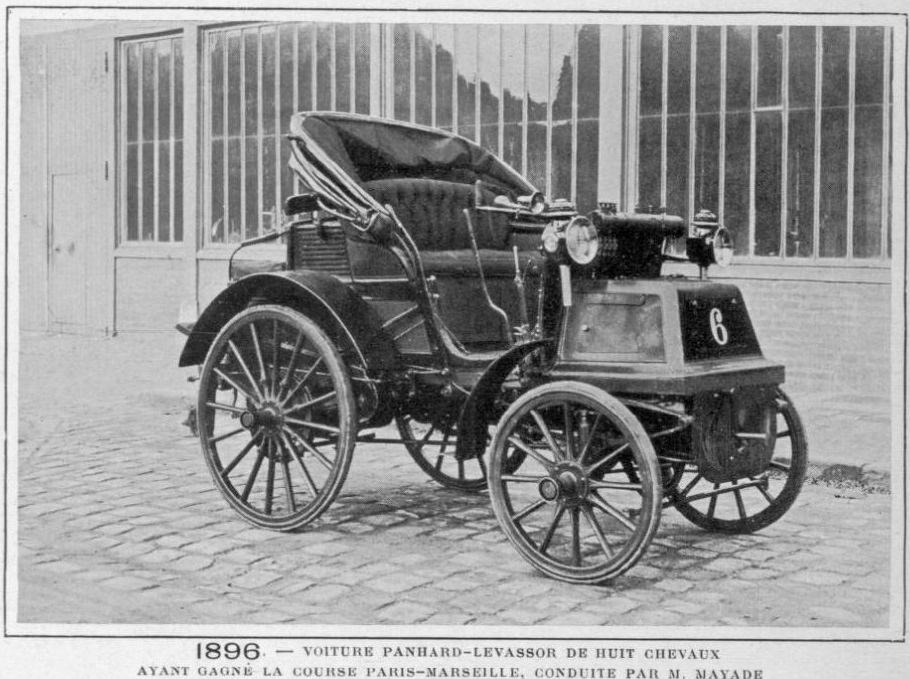 La Panhard et Levassor 8HP d'Émile Mayade, victorieux de Paris-Marseille-Paris en 1896.